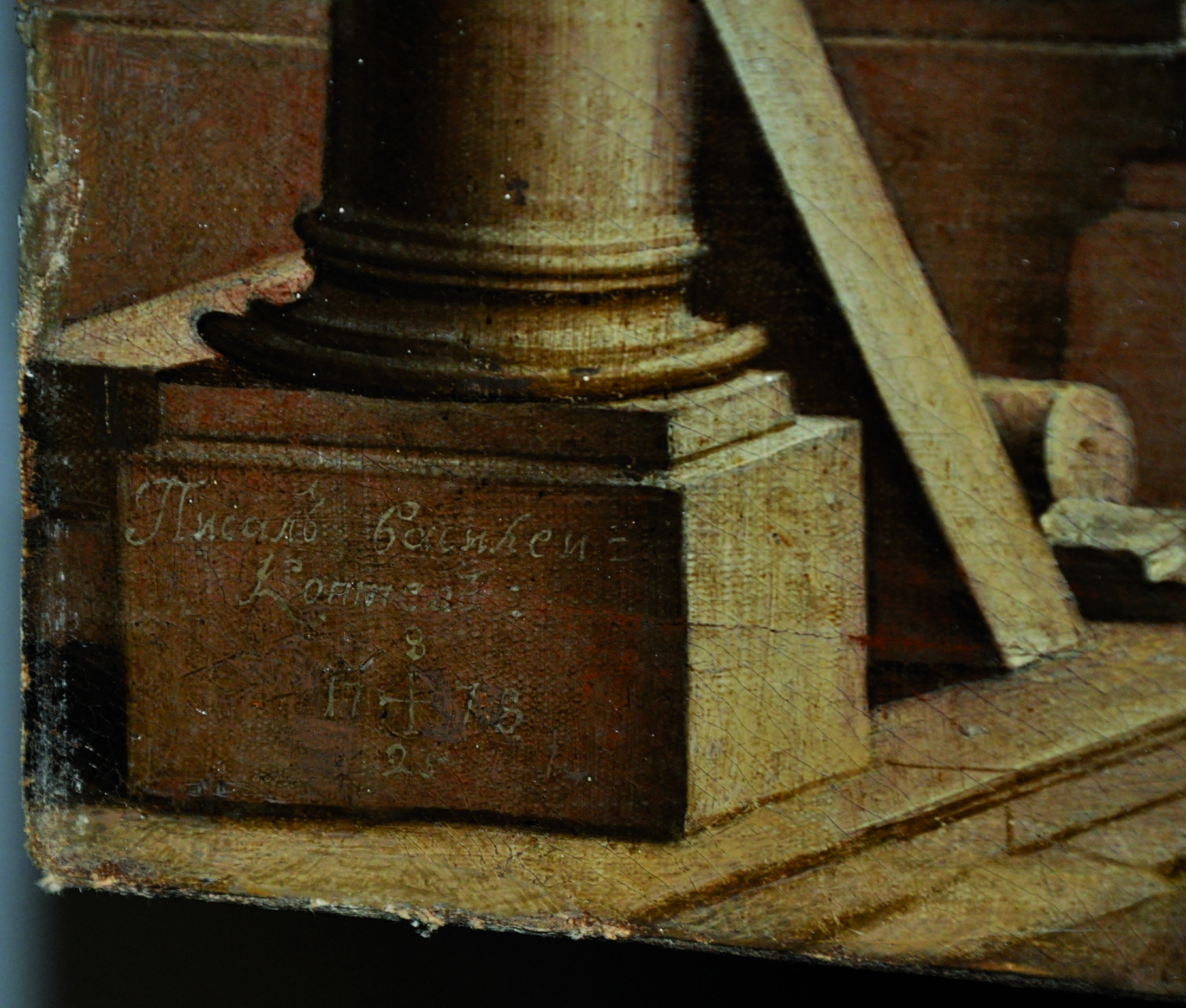 Подпись Василия Коптева на картине 1778 года. Фотография сделана в Италии, 2008 год.